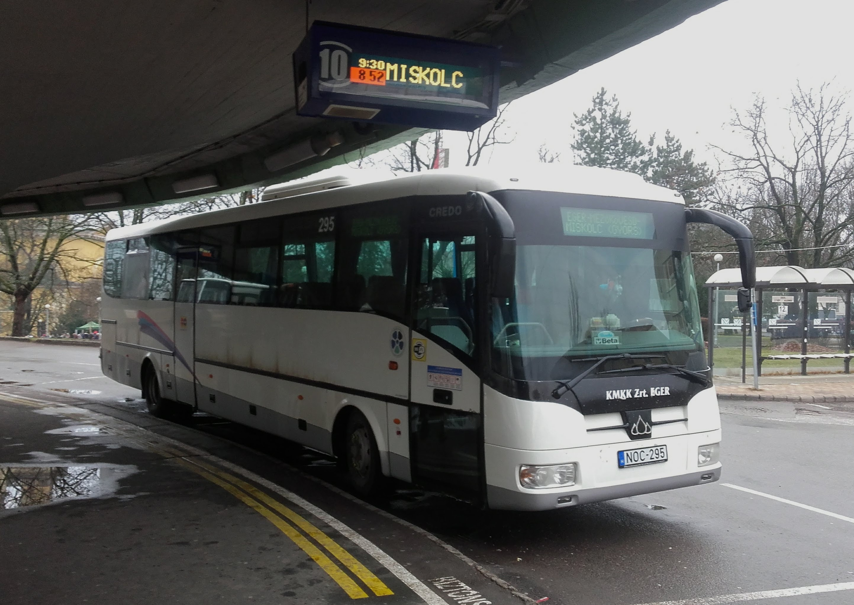 A KMKK NOC-295 rendszámú Credo IC 12 típusú busza Egerben, a 1380-as helyközi járaton.